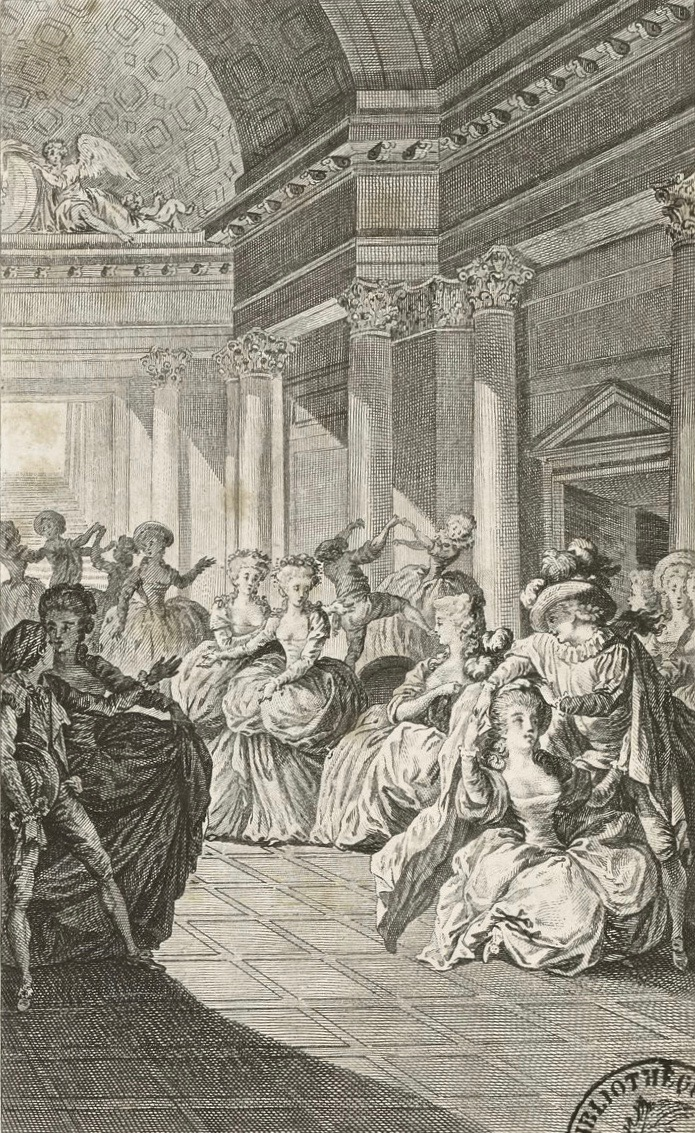 Claude-Nicolas Malapeau (1755-1803) nach Jacques-Philippe-Joseph de Saint-Quentin (* 1738): Illustration zum 4. Akt in der Erstausgabe von "Le mariage de Figaro" von Pierre-Augustin Caron de Beaumarchais (1732–1799), Ruault, Paris 1785. Bibliothèque nationale de France.